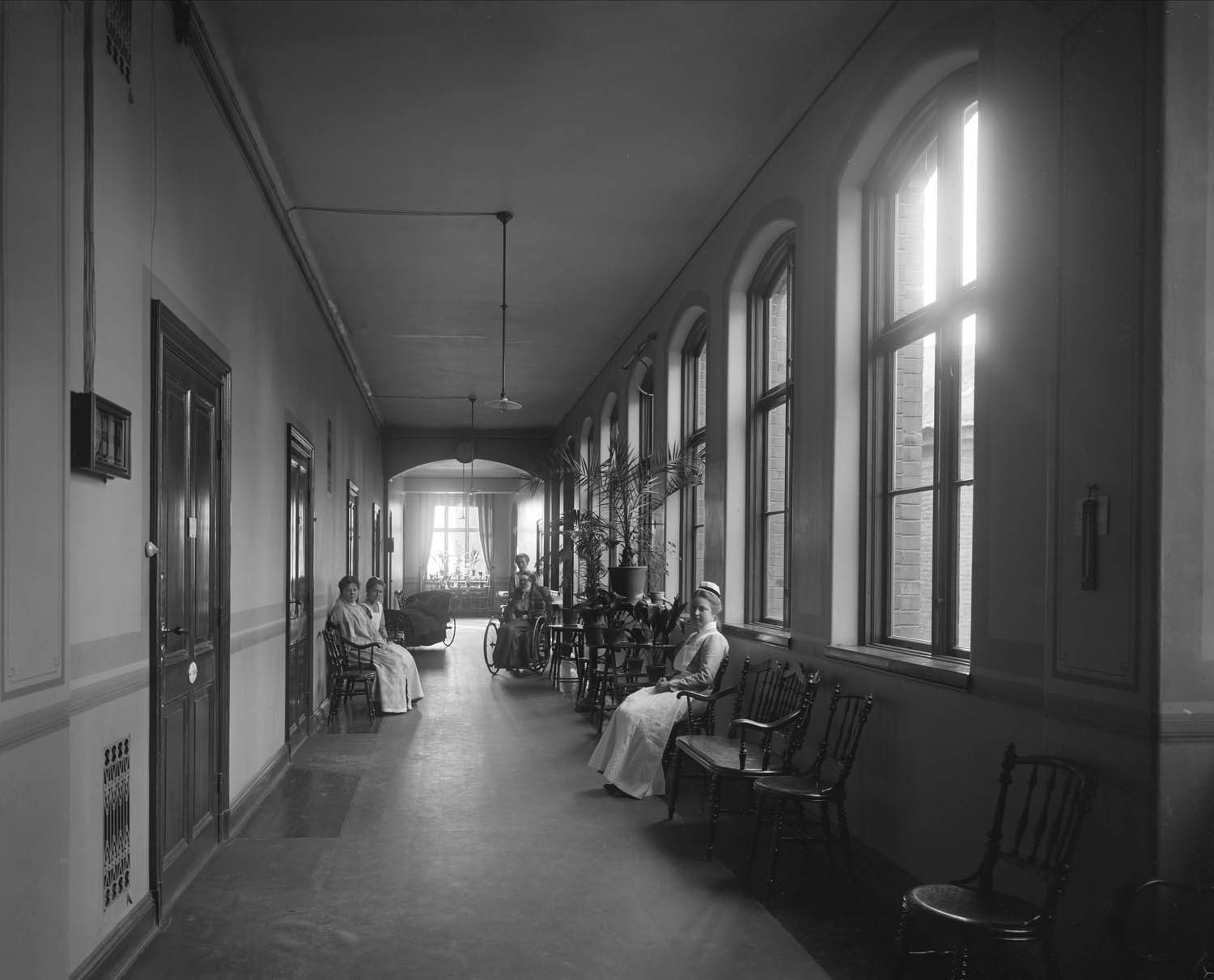 depicted place: Stockholm, Valhallavägen 91, Sophiahemmet (Sverige (SE))